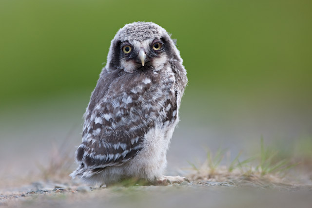 Jungvogel Sperbereule Surnia ulula